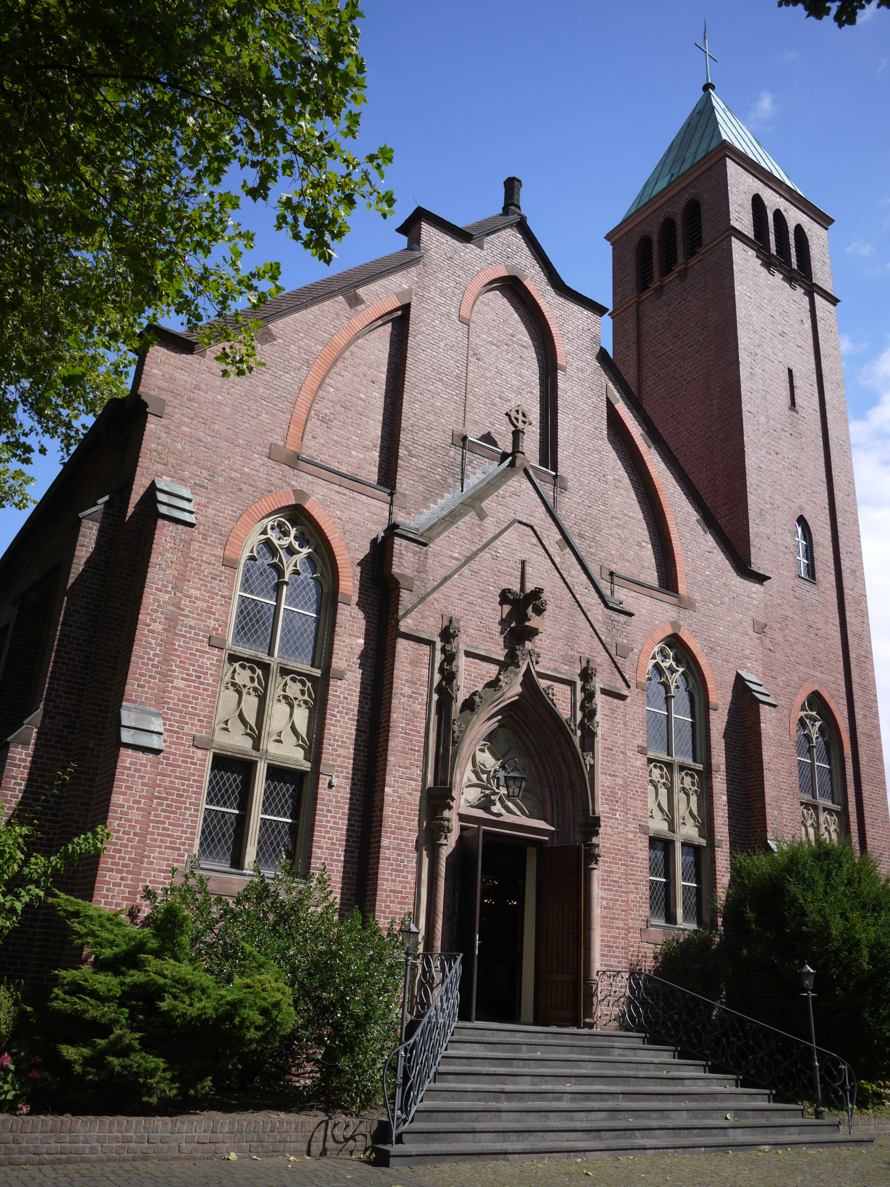 Evangelische Kirche in Moers Utfort, denkmalgeschützt